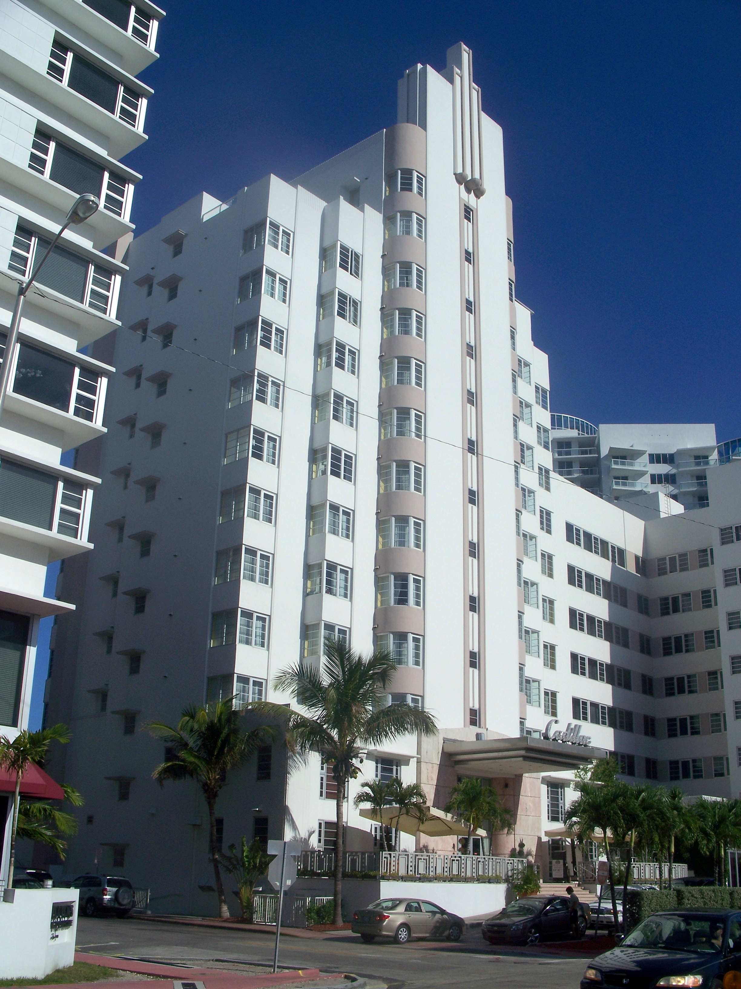 Miami Beach, Florida: Cadillac Hotel